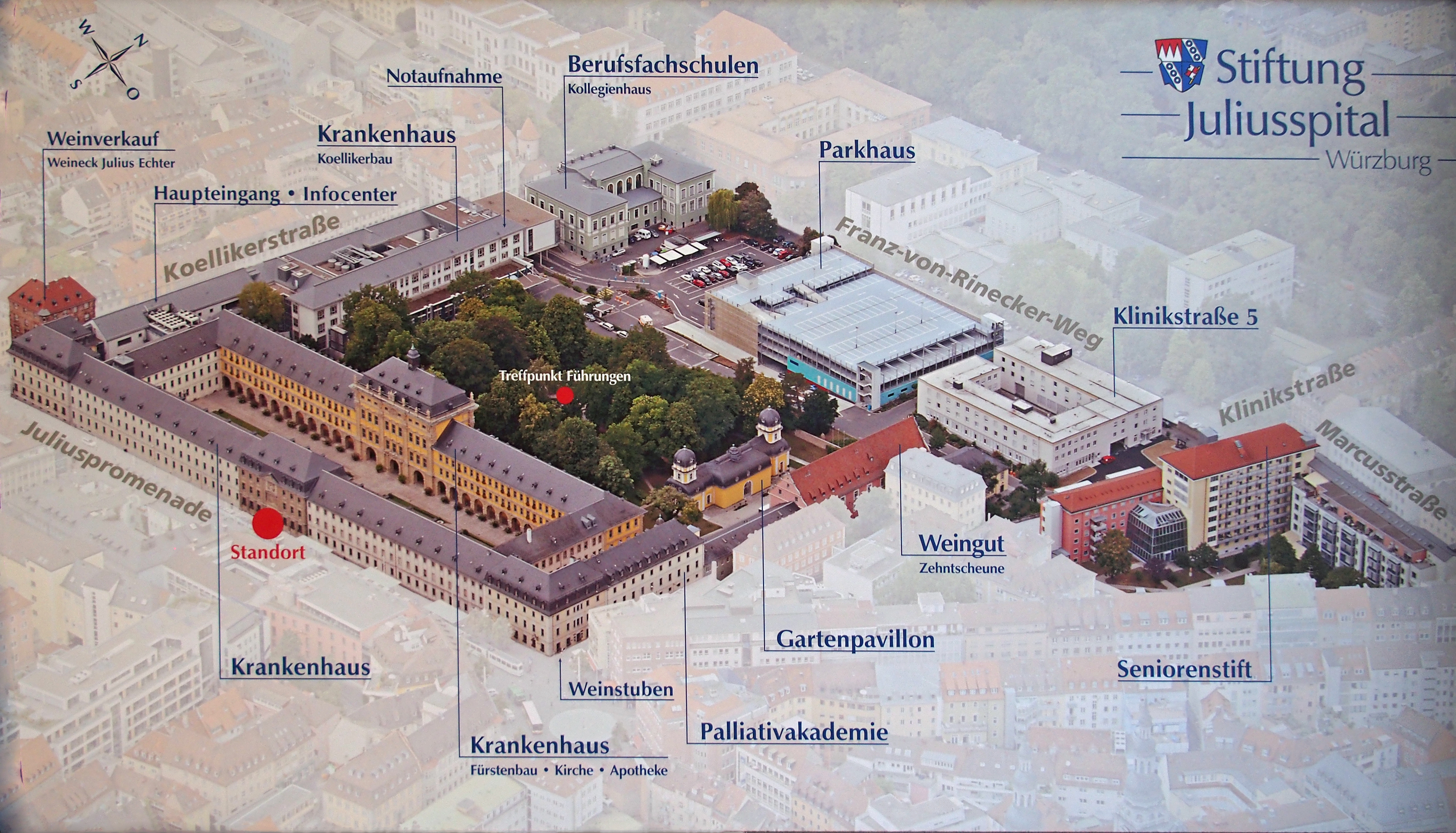 Übersichtsplan der Stiftung Juliusstift in Würzburg. Öffentlich zugänglicher Plan.